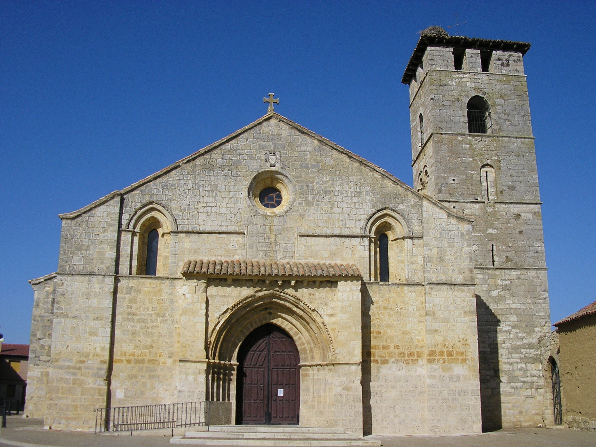 Husillos - Abadia 2